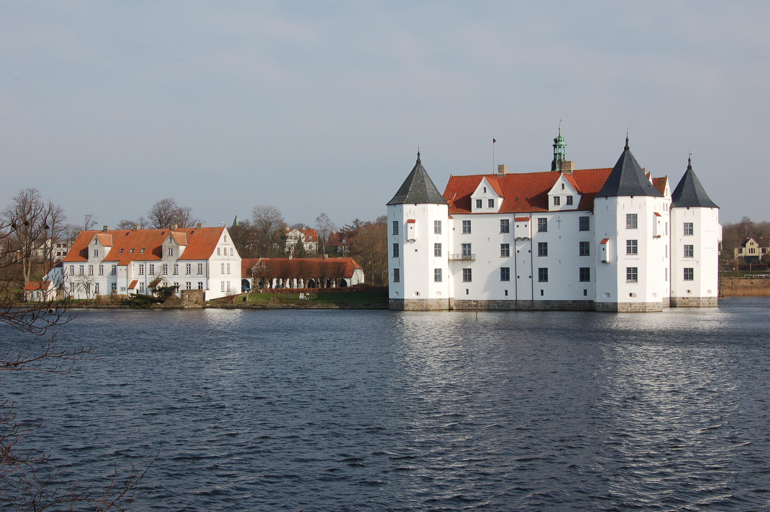 Schloss Glücksburg, 2007 Foto: Karl Nielsen, Munkbrarup